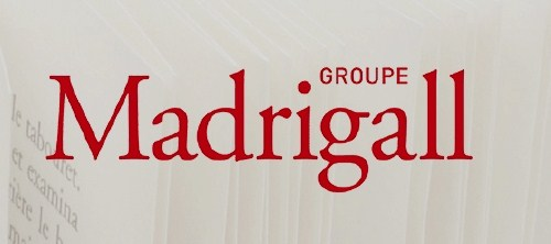 Logo du Groupe Madrigall, holding basé à Paris.